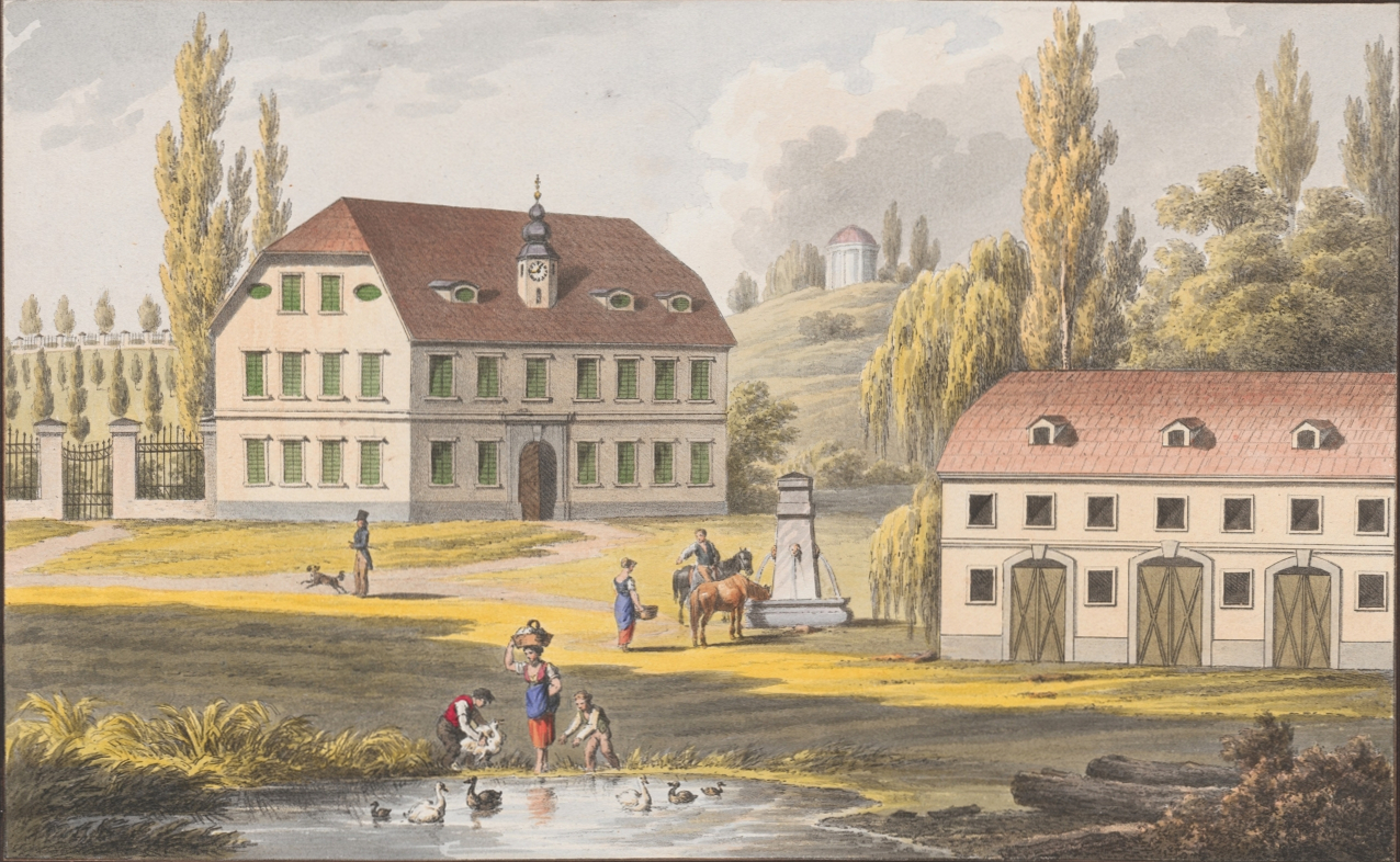 Kolovec